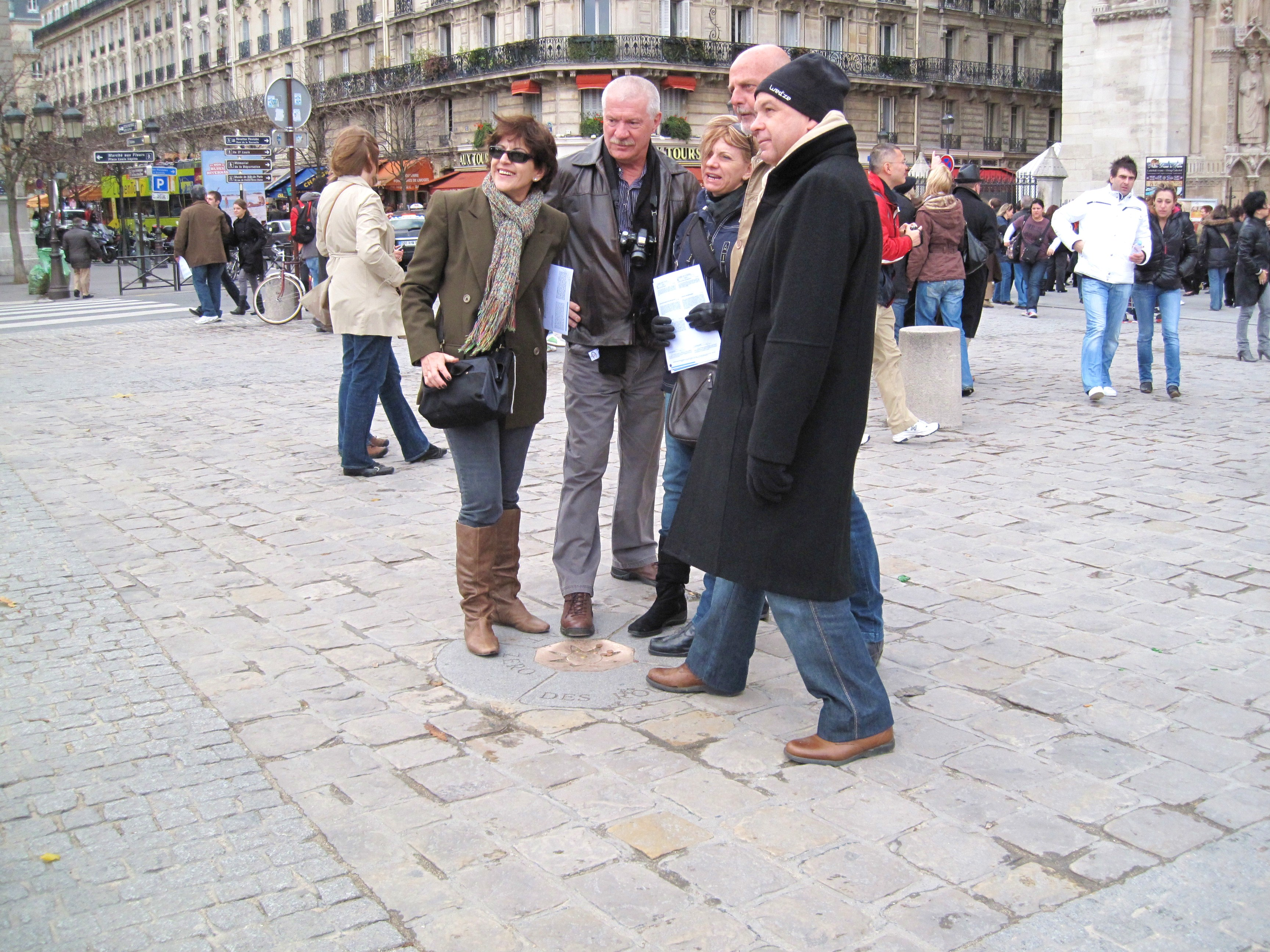 Le Point Kilomètre Zéro des Routes de France est devenu un lieu central symbolique. En effet, certains touristes aiment mettre un pied au centre du médaillon. D' autres personnes se font photographier autour de la dalle ou y déposent une pièce de monnaie en donnant l'impression qu' elles font un voeux ou sans intention précise. Ce point zéro peut symboliser le centre de convergence de toutes les villes de France, le lien avec les villes, particulièrement celles les plus éloignées de Paris, ou encore le centralisme de l' Etat. Le Point Zéro (plus précisément le Point Kilomètre Zéro) des Routes de France est matérialisé par une dalle en quatre quartiers au centre de laquelle est placé un médaillon hexagonal représentant une rose des vents. C' est à partir de ce point que sont calculées, en kilomètres, les distances routières entre Paris et les autres villes de France. Ce Point Zéro est situé sur le parvis de Notre-Dame de Paris. Paris, France.